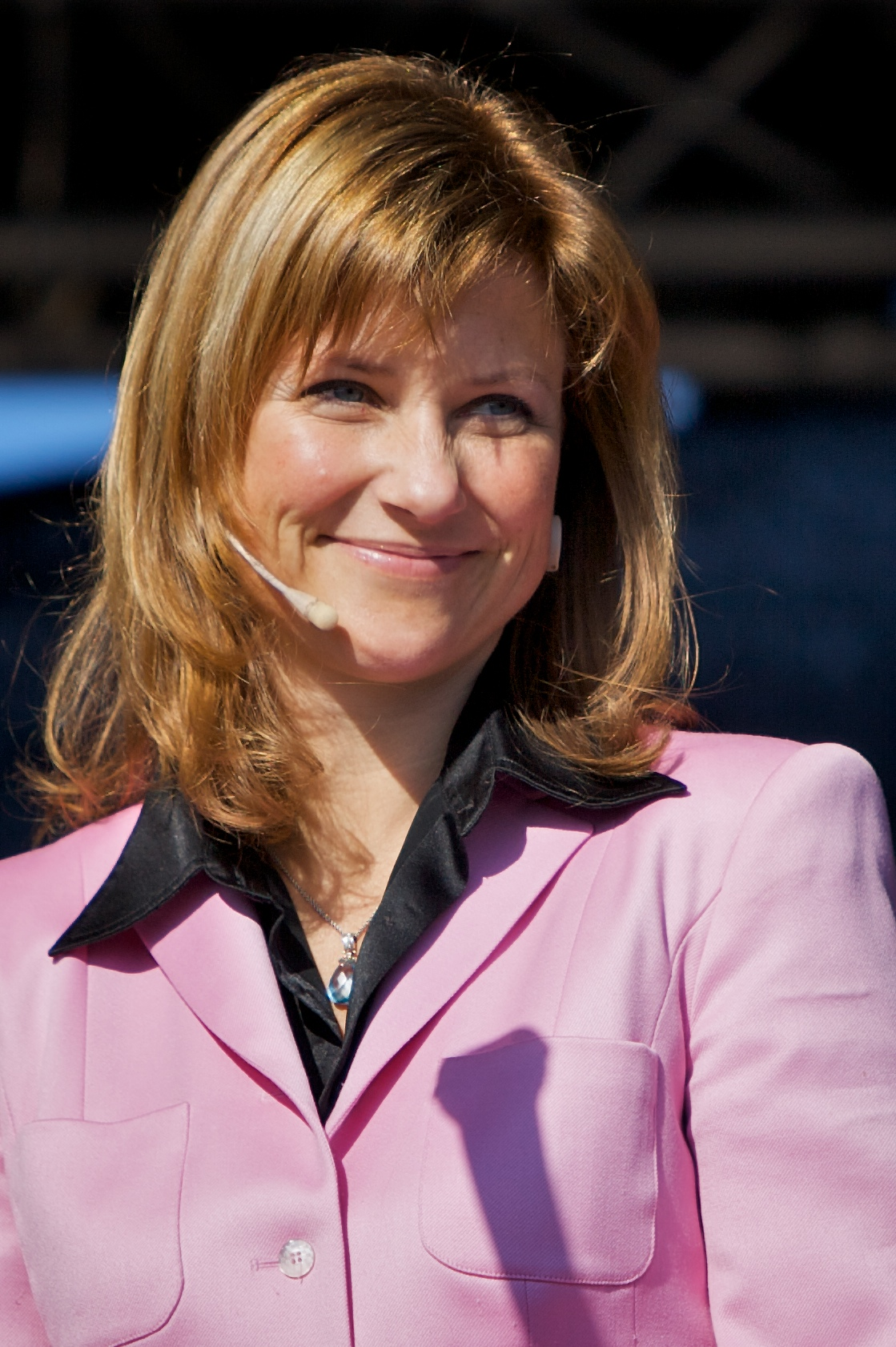 Märtha Louise